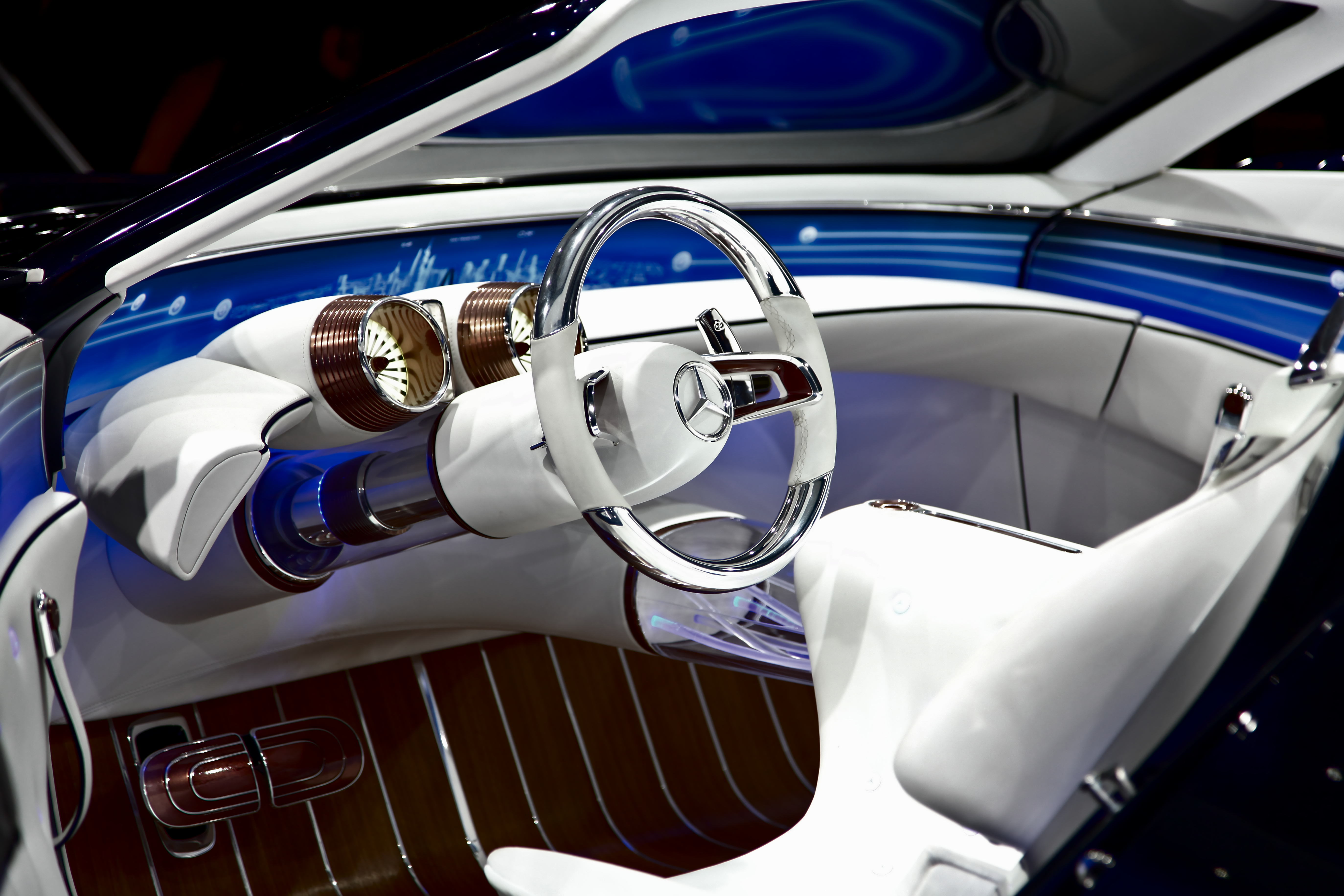 Vision Mercedes-Maybach 6 Cabriolet Cockpit auf der IAA 2017